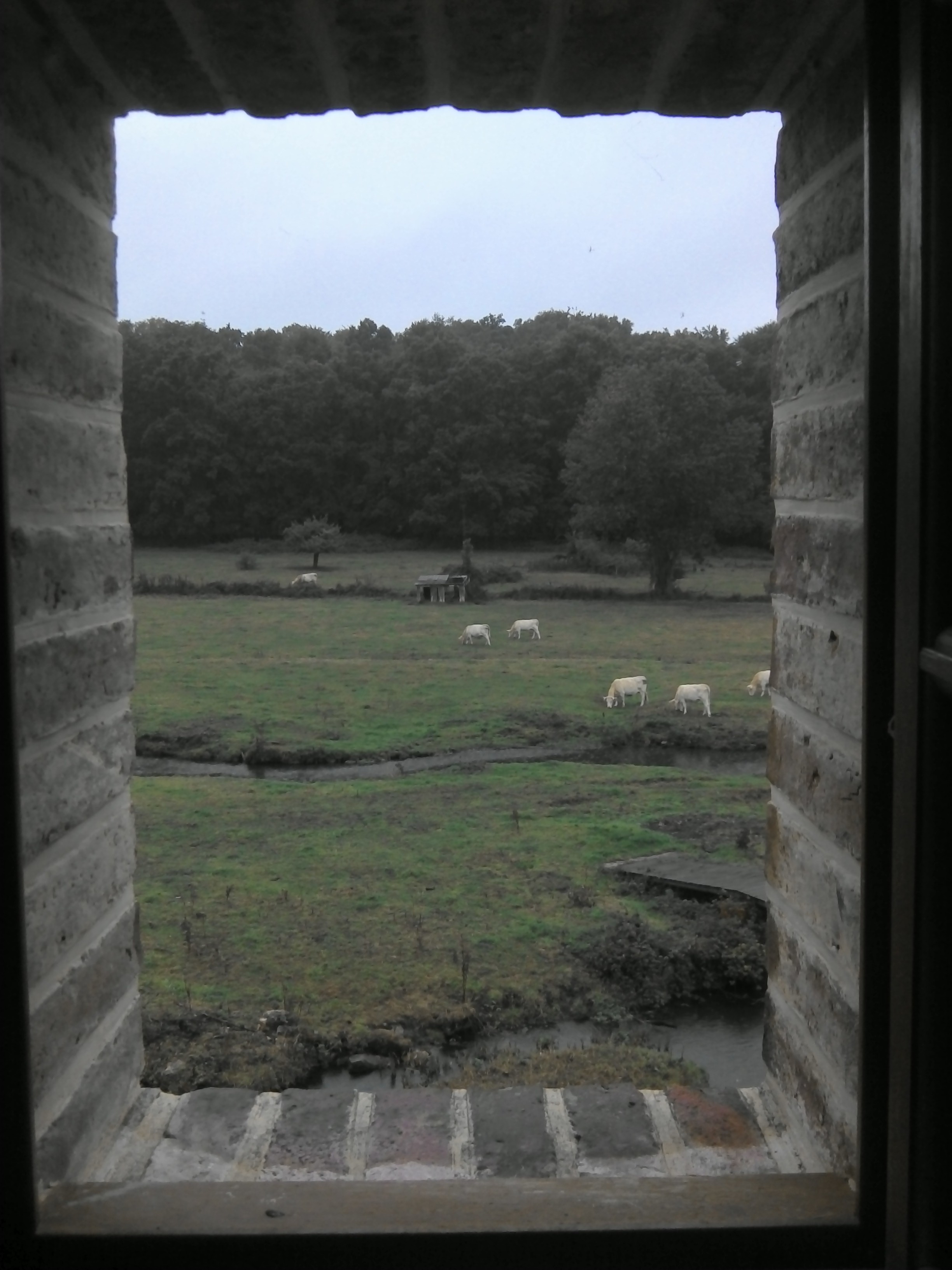 vue normande, paysage matin, Eure